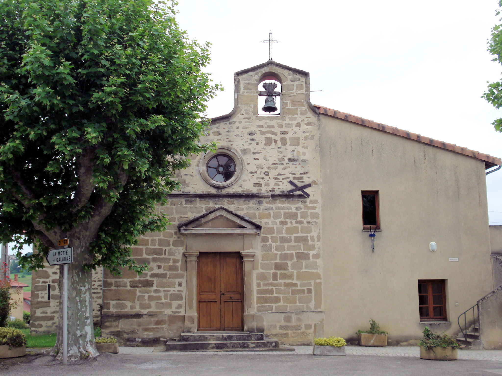 église de Fay-le-Clos dans la Drôme